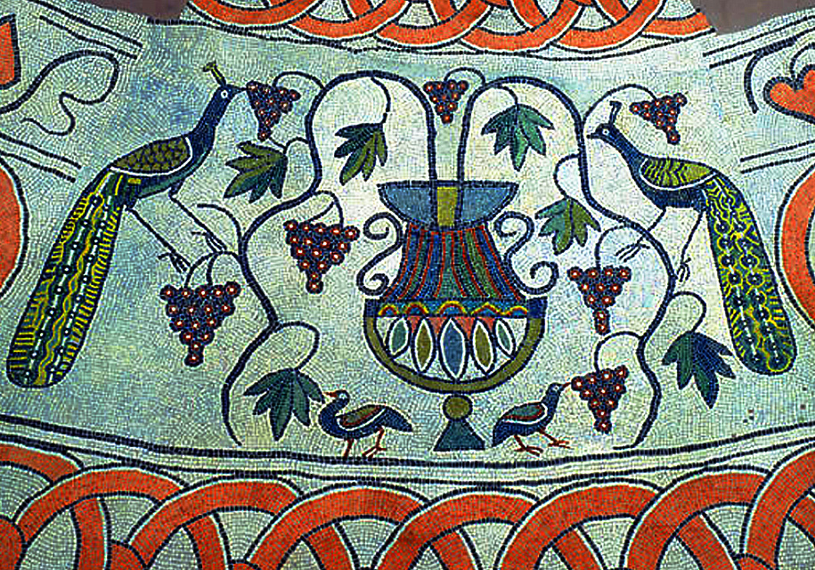 Baptistère paléochrétien de Butrint, en Albanie, construit au VIe siècle